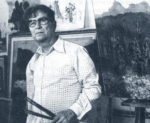 Тойво Ряннель, финский художник